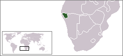 Description:Carte de localisation du bantoustan du Kaokoveld, Namibie Auteur:Rémih